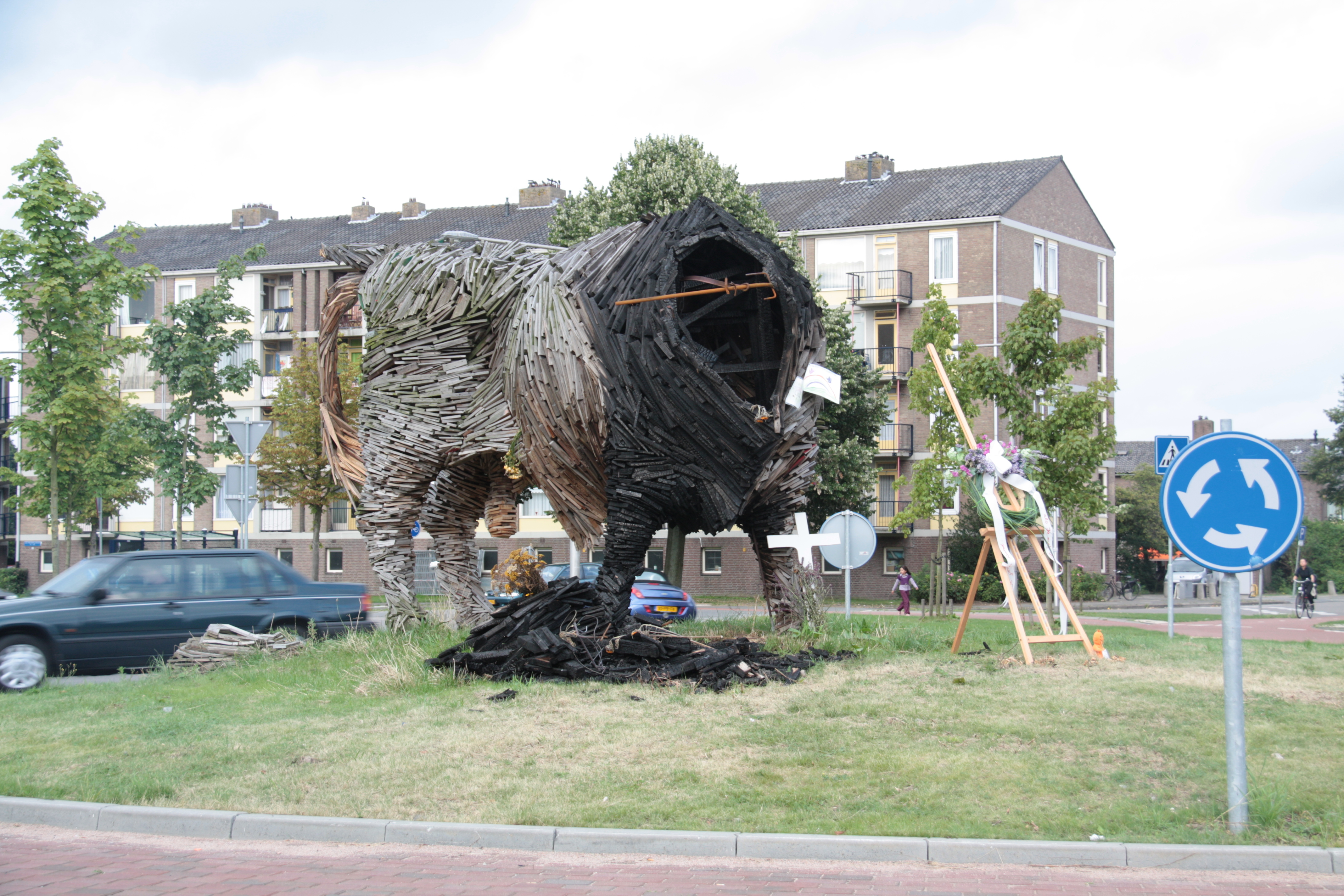 "De Stier" een voormalig beeld in Amersfoort.